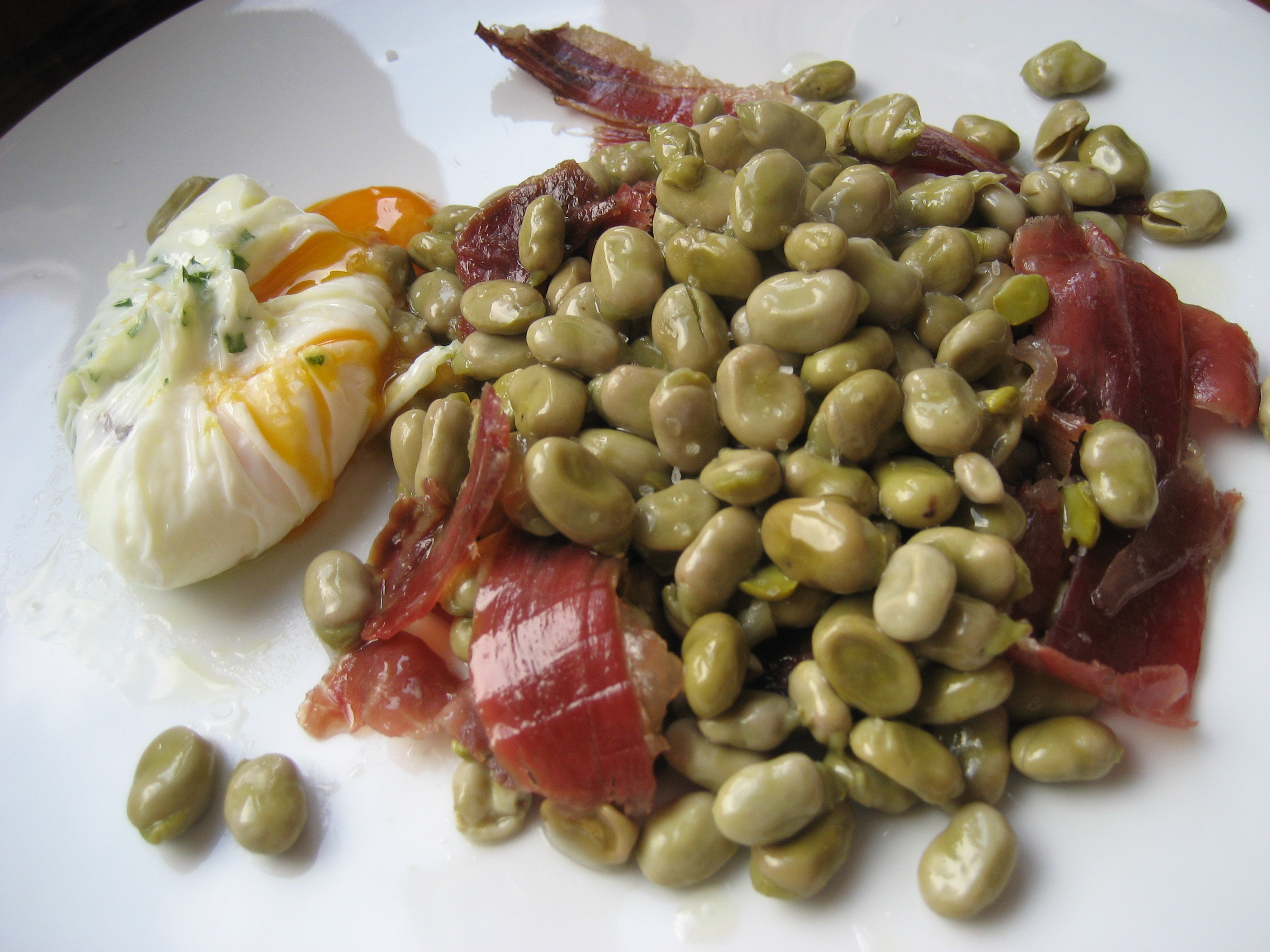 Tellergericht mit Bohnenkernen, rohem Schinken und Ei; typisches Essen der Küche Granadas